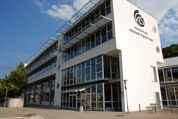 Hochschule Albstadt-Sigmaringen Standort Albstadt, Jakobstraße 1, 1. Bauabschnitt